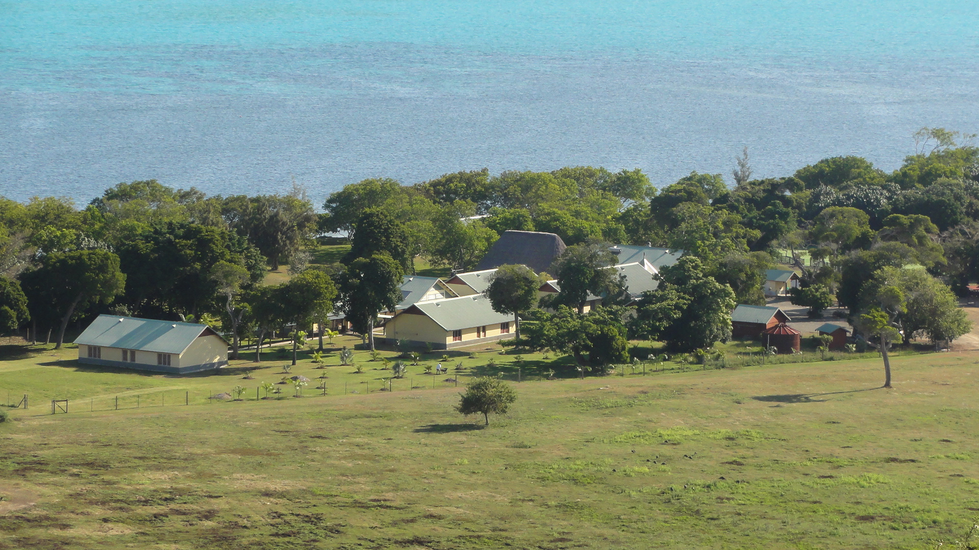 C.a.p. de Poé